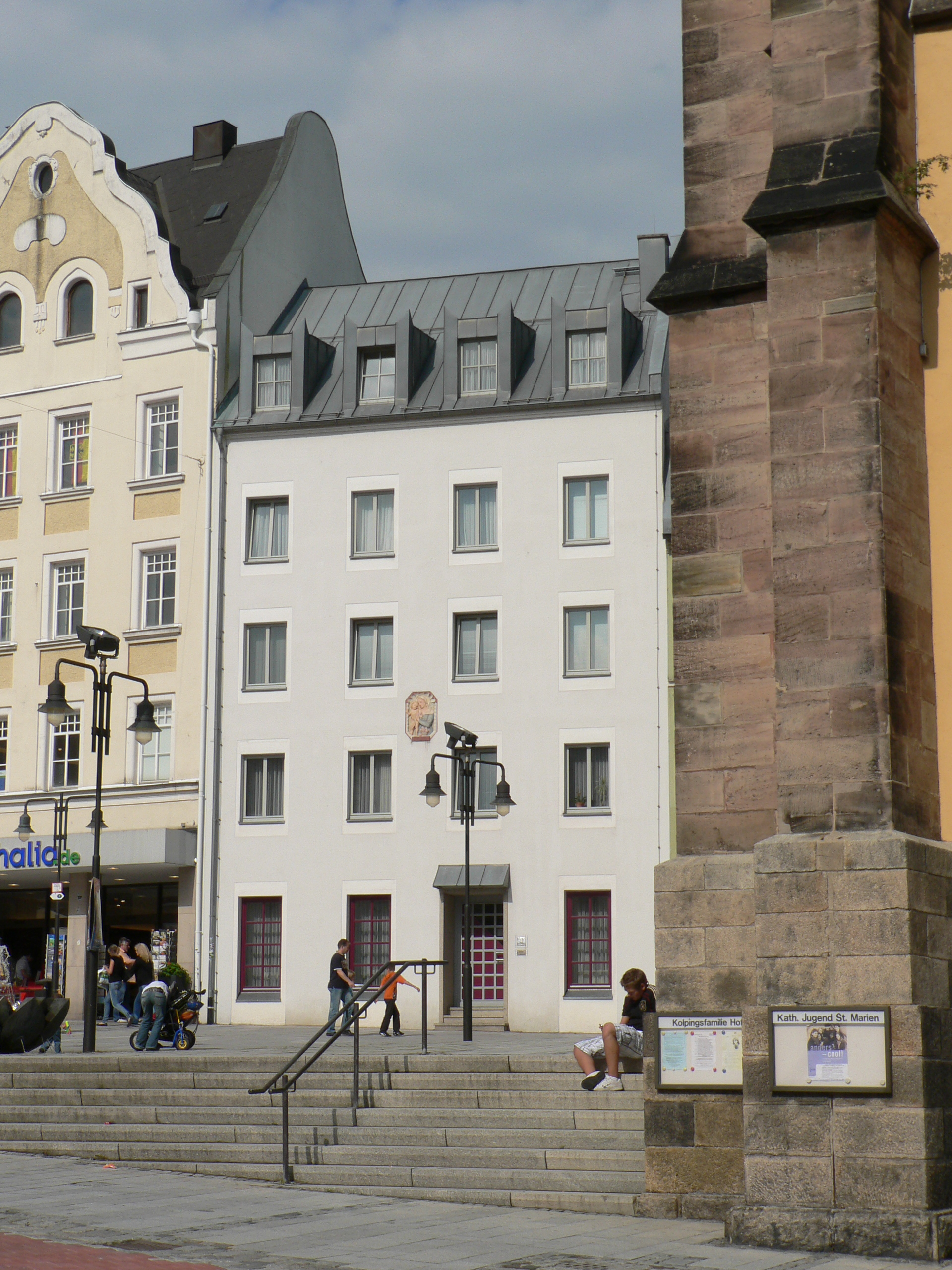 St. Marien Hof, Stadtpfarramt